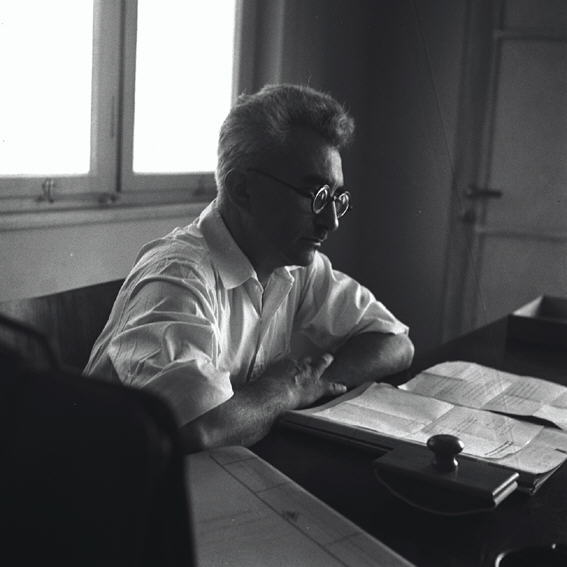 ירושלים - מ. בנטוב, שר העבודה הראשון של מדינת ישראל